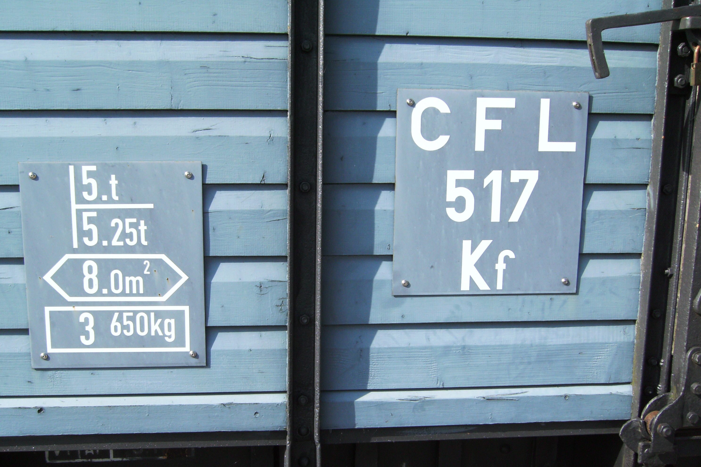 wagon construit en 1890, exposé à Niederpallen